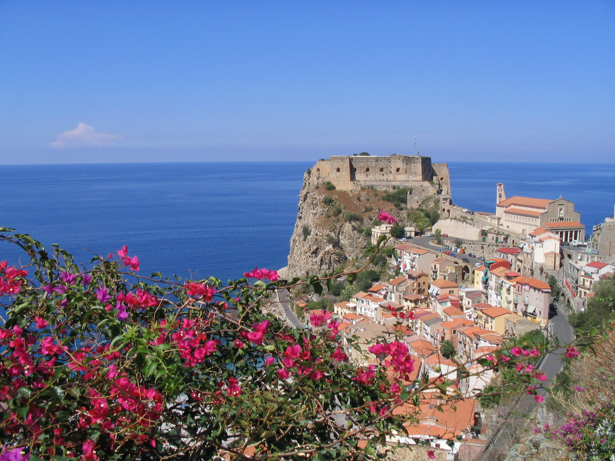 Scilla_Castello